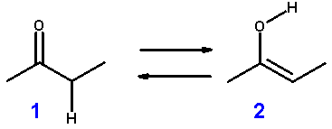 Keto_enol_tautomerism